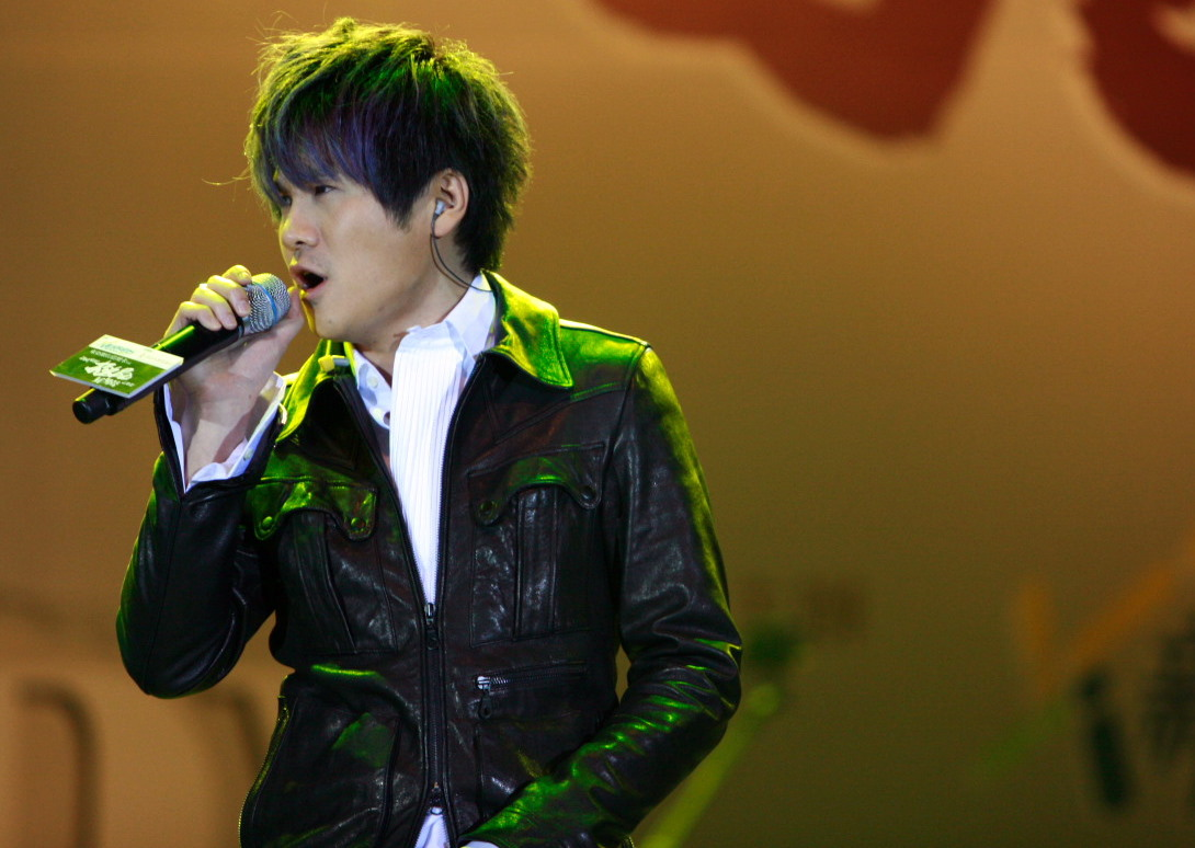 Gary Chaw / Cao Ge